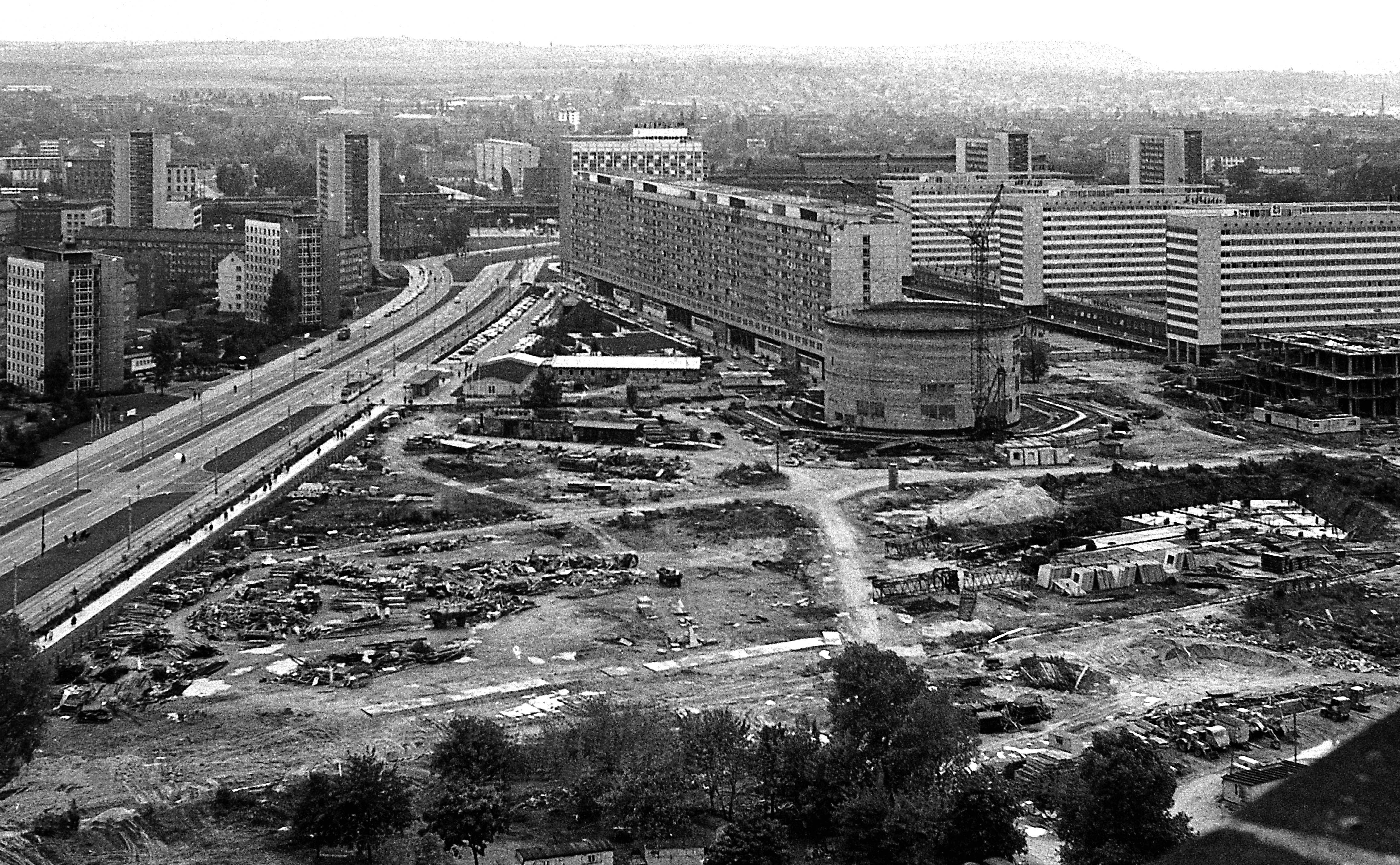 03.10.1970 8010 Dresden: Blick vom Rathausturm nach Süden Richtung Hauptbahnhof. An der Prager Straße entsteht gerade das Rundkino (GMP: 51.044937,13.736964) und rechts am Bildrand das spätere Restaurant Wroclaw. Davor stecken gut sichtbar schon die mächtigen Fundamente des geplanten, aber später nie gebauten Hochhauses in der Erde vom Ferdinandplatz. [F19701001A]19701003300(c)Blobelt